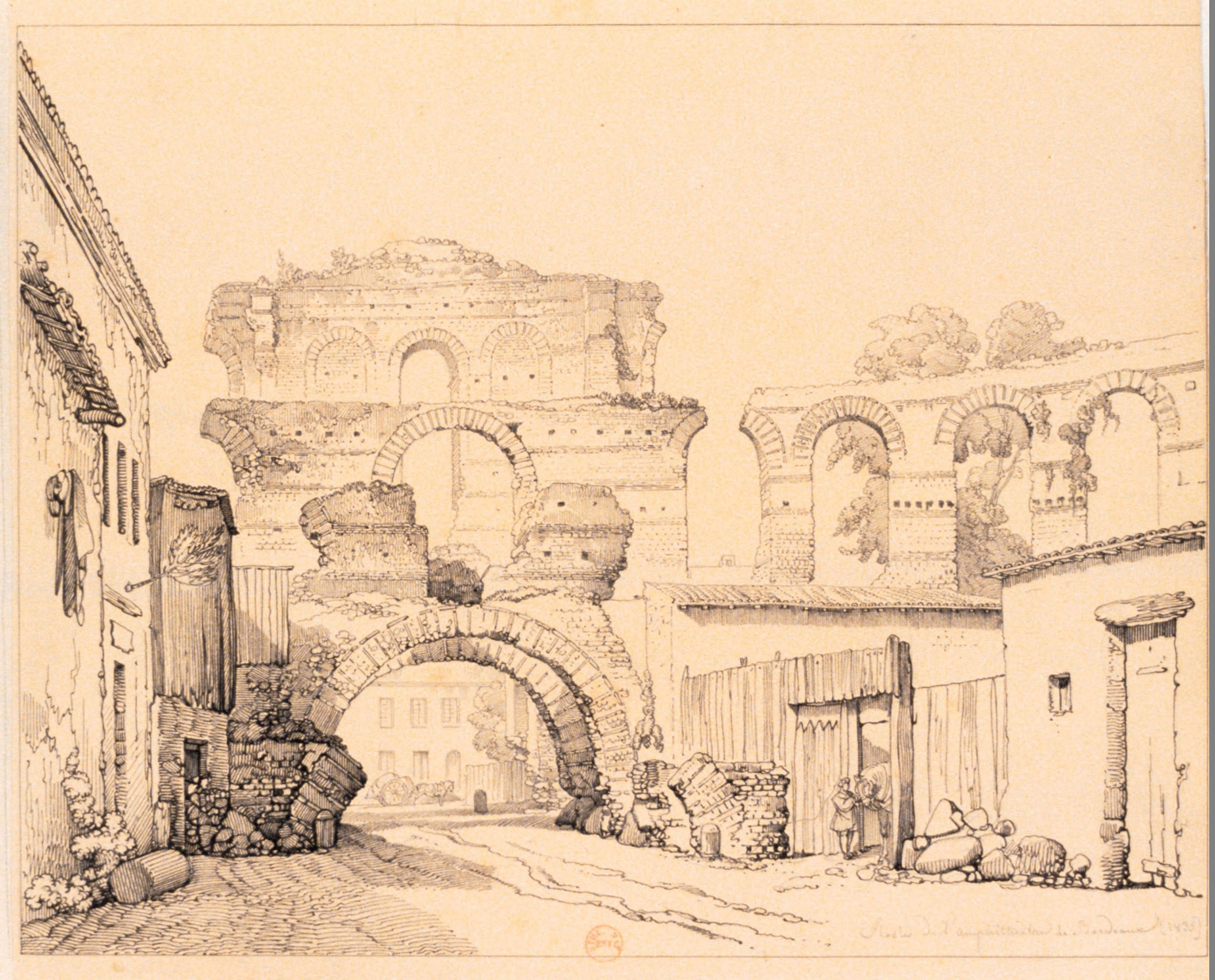 Restes de l'amphithéatre de Bordeaux, dessin à la plume et encre de Chine